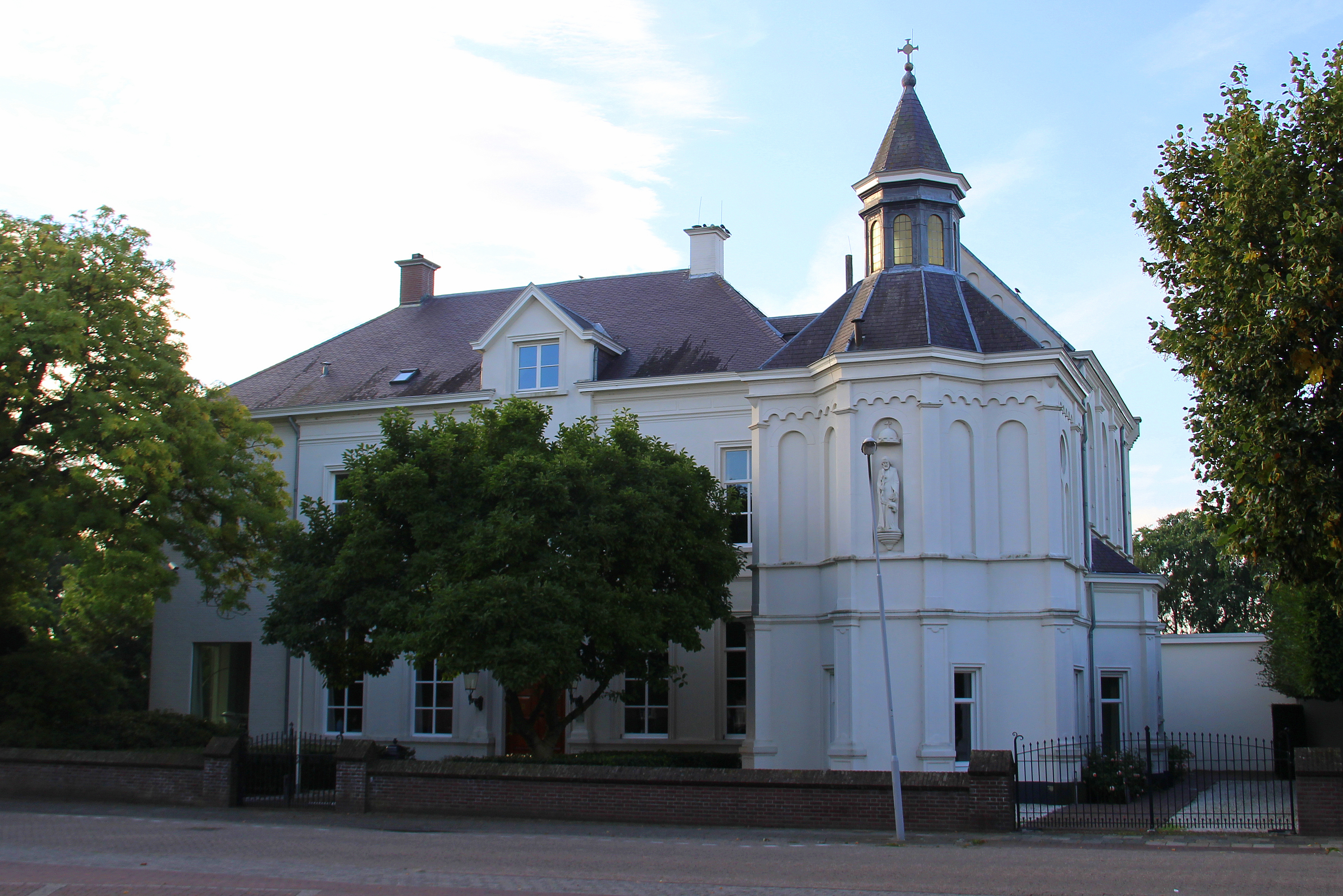 Het oudste deel van het voormalig klooster van de Zusters van Liefde wordt gevormd door een gepleisterde eclectische villa uit circa 1850, gebouwd voor Willem de Gier. De villa is in 1905 in gebruik genomen als klooster en in 1951 vergroot. Rechts ervan staat haaks een gepleisterd eclectisch kloostergebouw, waarvan de begane grond in 1922 is gebouwd naar ontwerp van W.C. van Erp. De verdieping met kapel kwam in 1928 tot stand naar neogotisch ontwerp van H.M. Vorstermans.